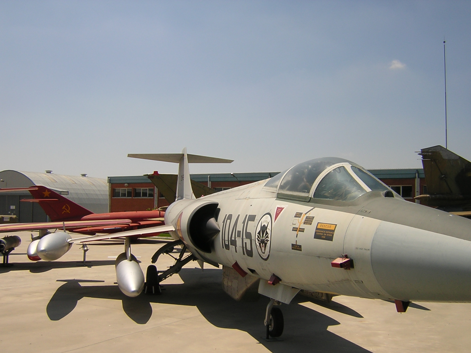 Un Lockheed F-104 Starfighter, antiguamente perteneciente al Ejército del Aire, ahora expuesto en el Museo del Aire en Cuatro Vientos, Madrid.